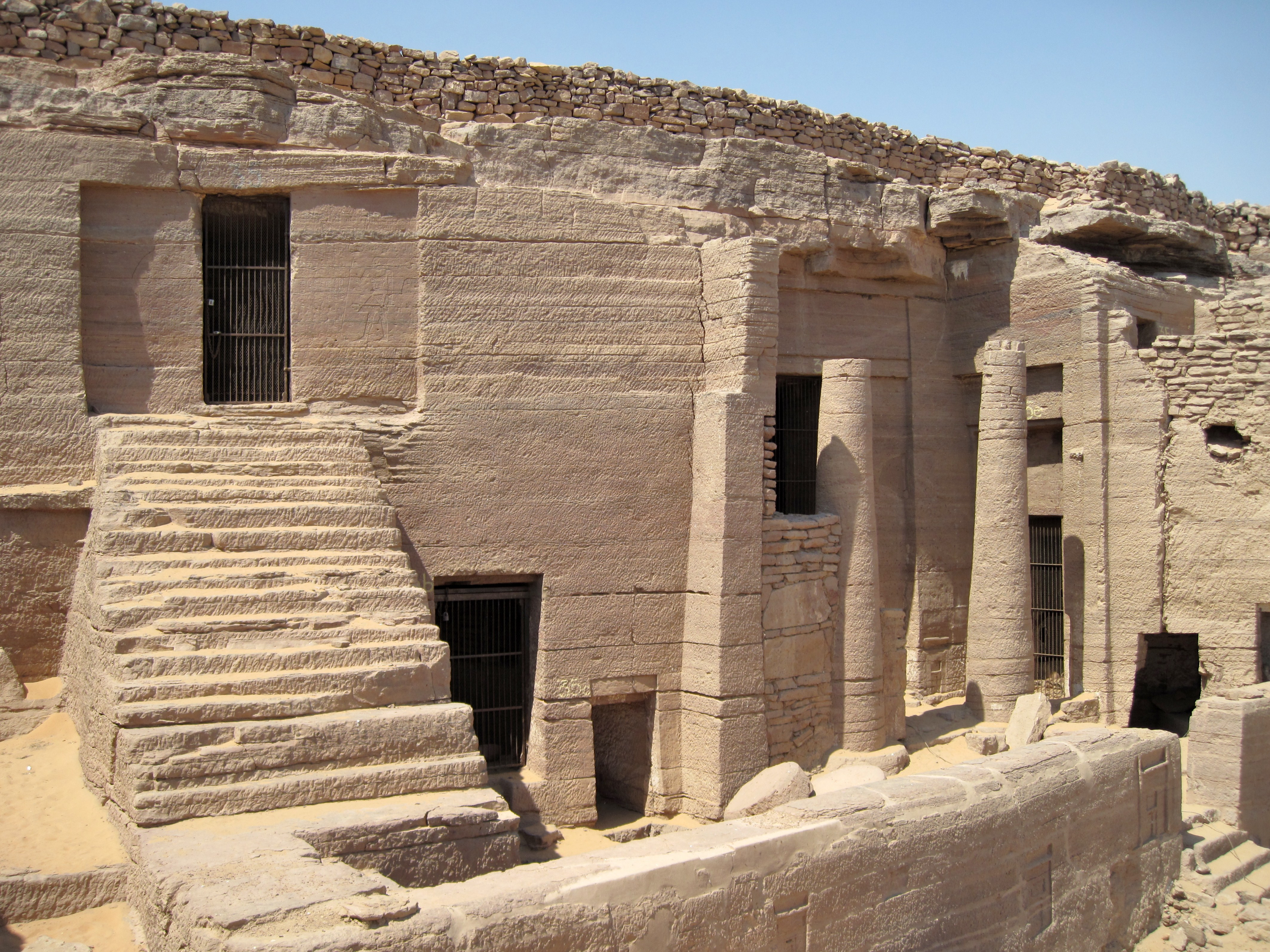 Eingang zum Felsengrab des Heqa-ib auf dem Qubbet el-Hawa bei Assuan, Ägypten